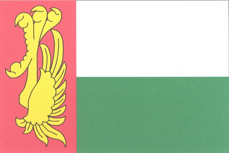 Vlajka, Obořiště, okres Příbram